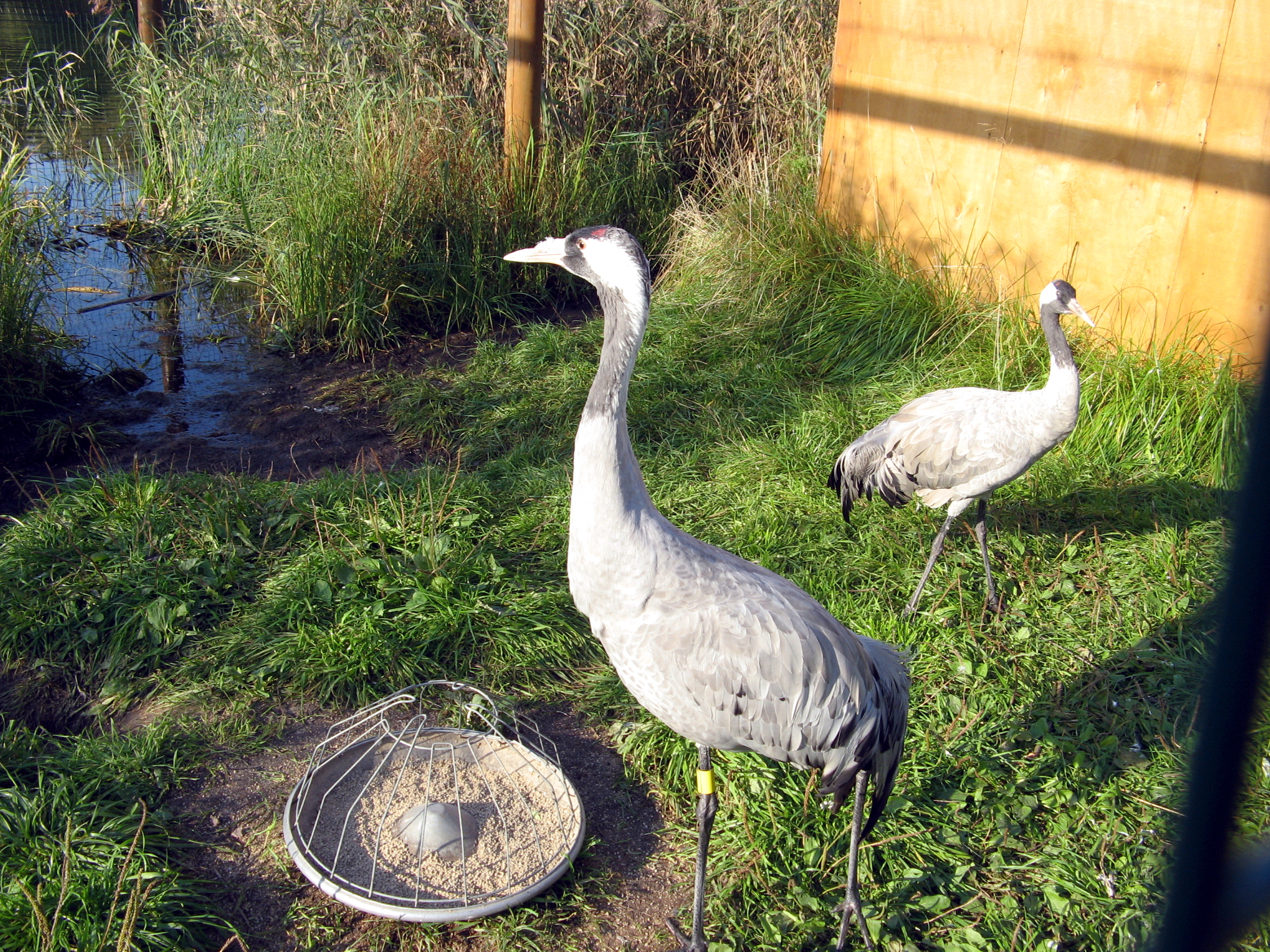 Серых журавлей в Москве можно встретить не только в зоопарке.